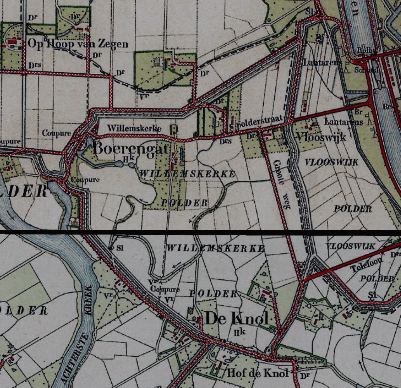 Willemskerkepolder